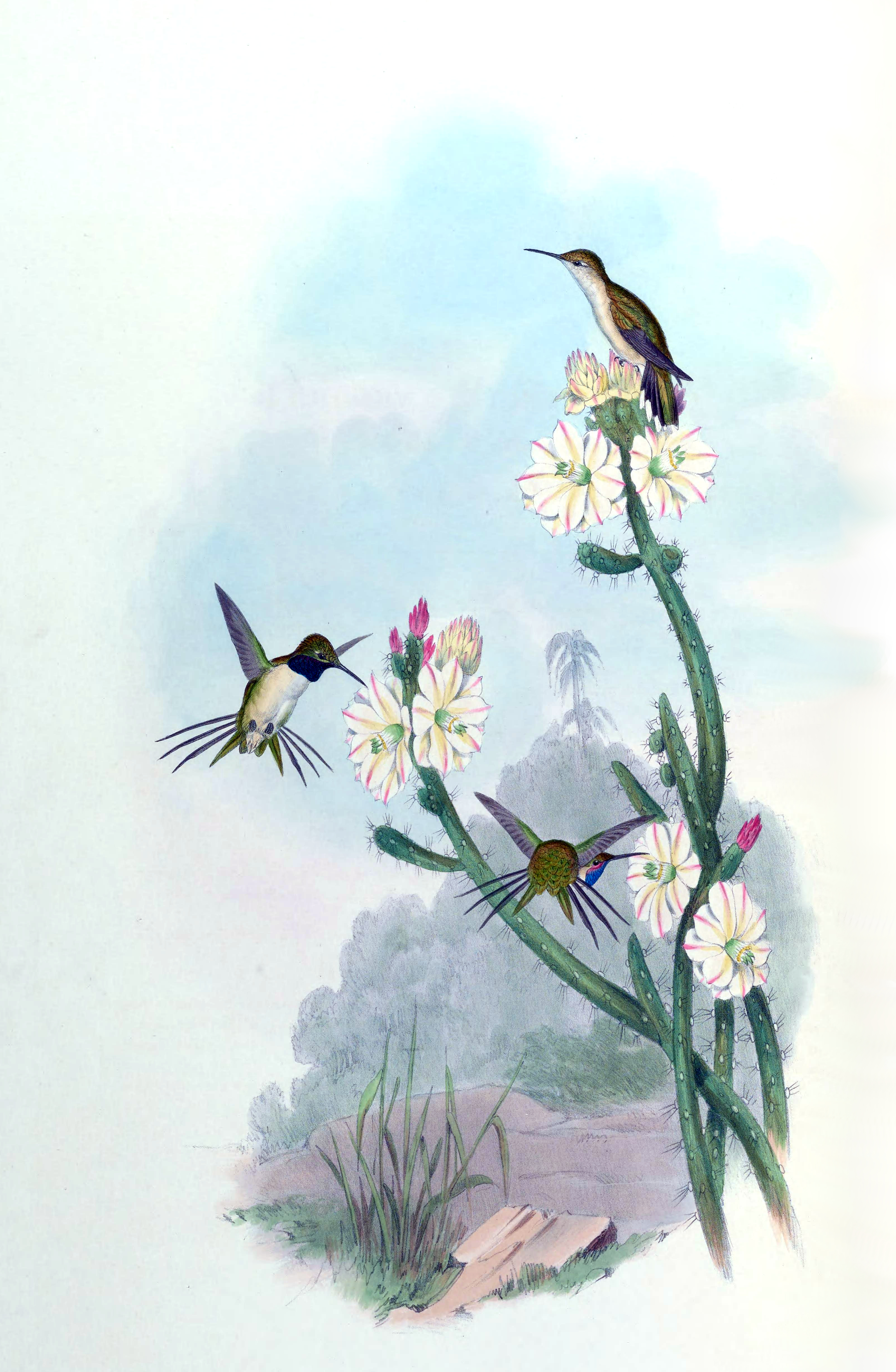 Eulidia yarrellii = Syn: Calothorax yarelli in John Gould's Hummingbirds ISBN 978-1555216610